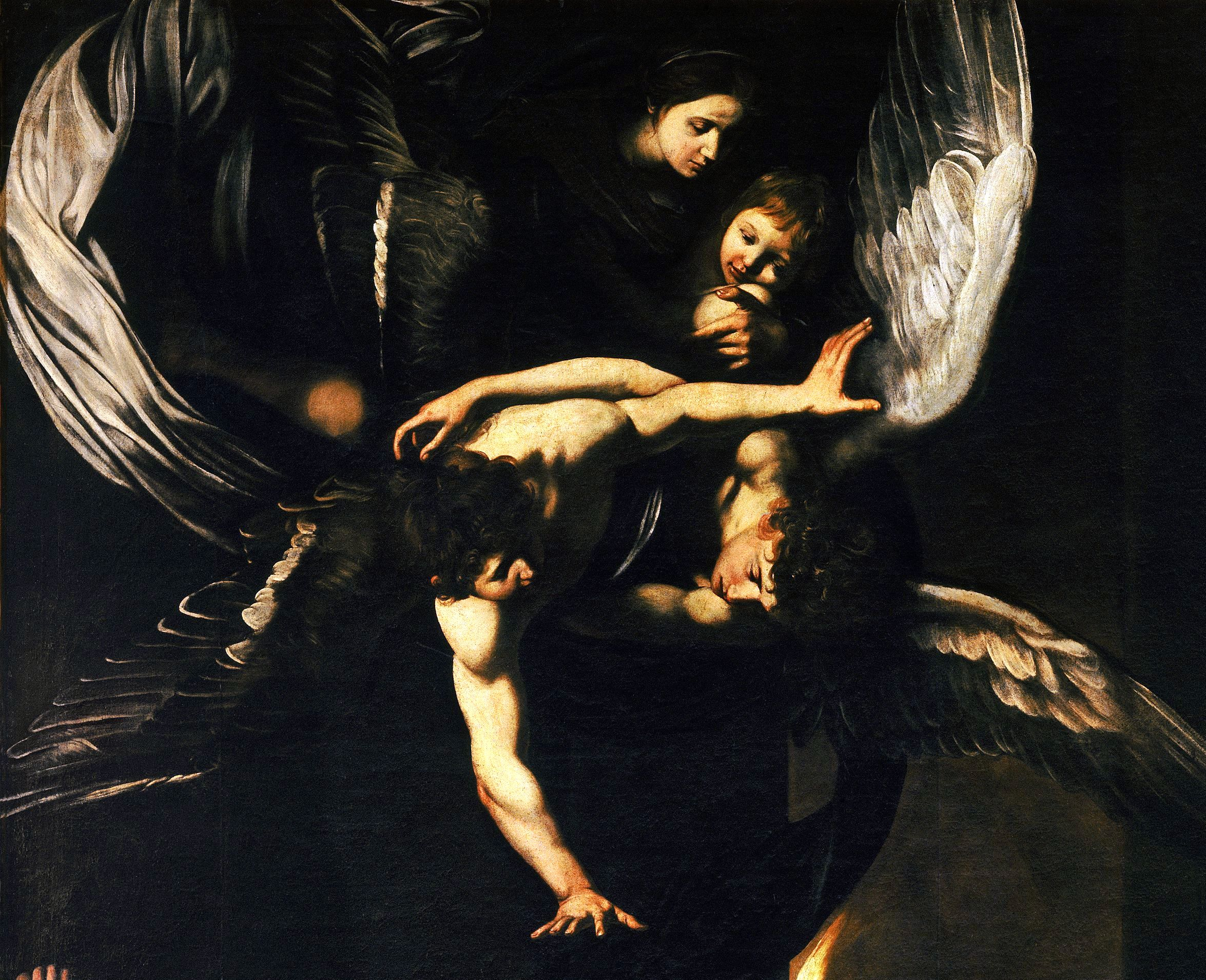 Sette opere di Misericordia (1606, Pio Monte della Misericordia - Naples). Madonna col Bambino e angeli